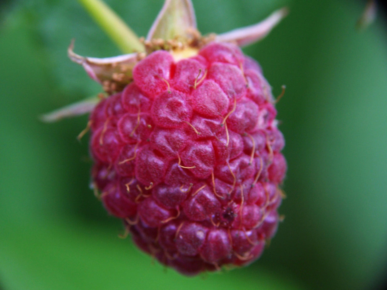 Rubus idaeus (pl. malina domowa)